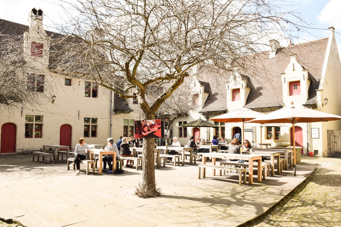 Binnentuin/terras